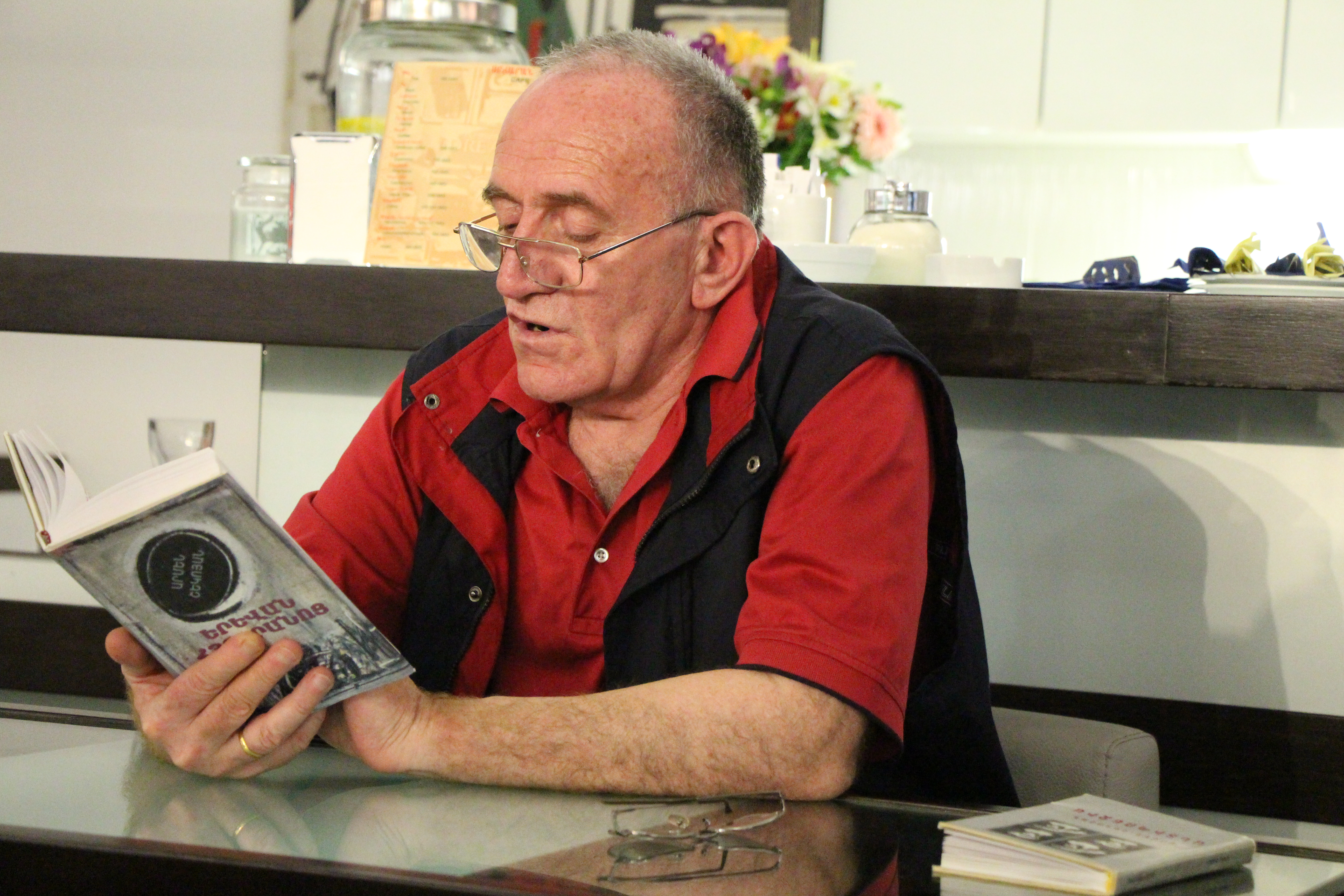 հայ գրող, բանաստեղծ Արմեն Շեկոյան